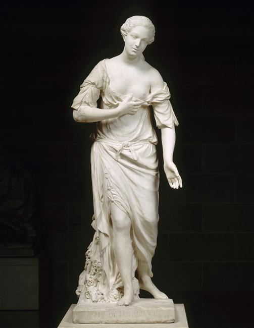 L'Amitié sous les traits de Mme de Pompadour, par Jean-Baptiste Pigalle, musée du Louvre, RF3026.